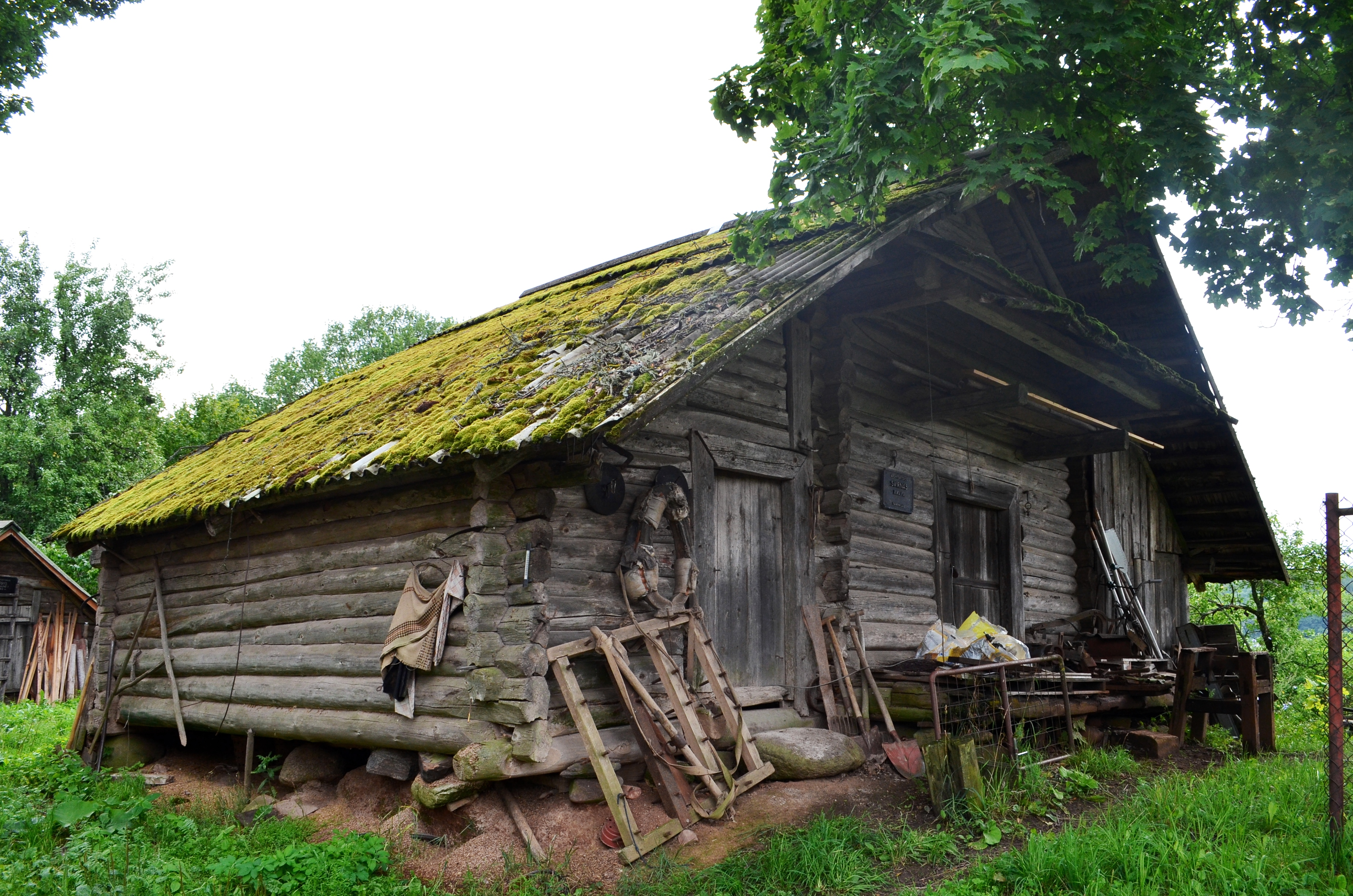 Svirnas, Salų (II) k., Ignalinos raj.